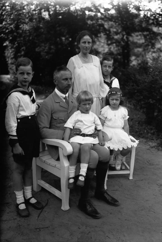 Neueste Aufnahmen des Prinzen Oskar von Preussen im Kreise seiner Familie. Unser Bild zeigt den Prinzen mit seiner Familie im Garten seiner Villa in Potsdam.